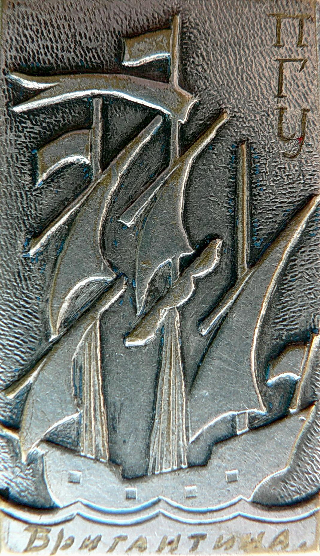 Один из двух вариантов значка участника ансамбля "Бригантина" (Пермский университет). Разработчик дизайна - Юрий Максимович Суетин.